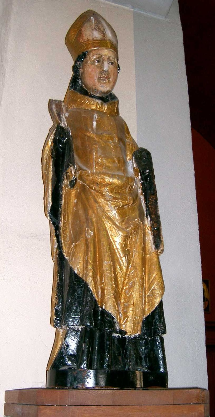 Statue en bois polychrome du XVe siècle représentant saint Théodule (Theodulus) - église de Marigny (département du Jura - France)